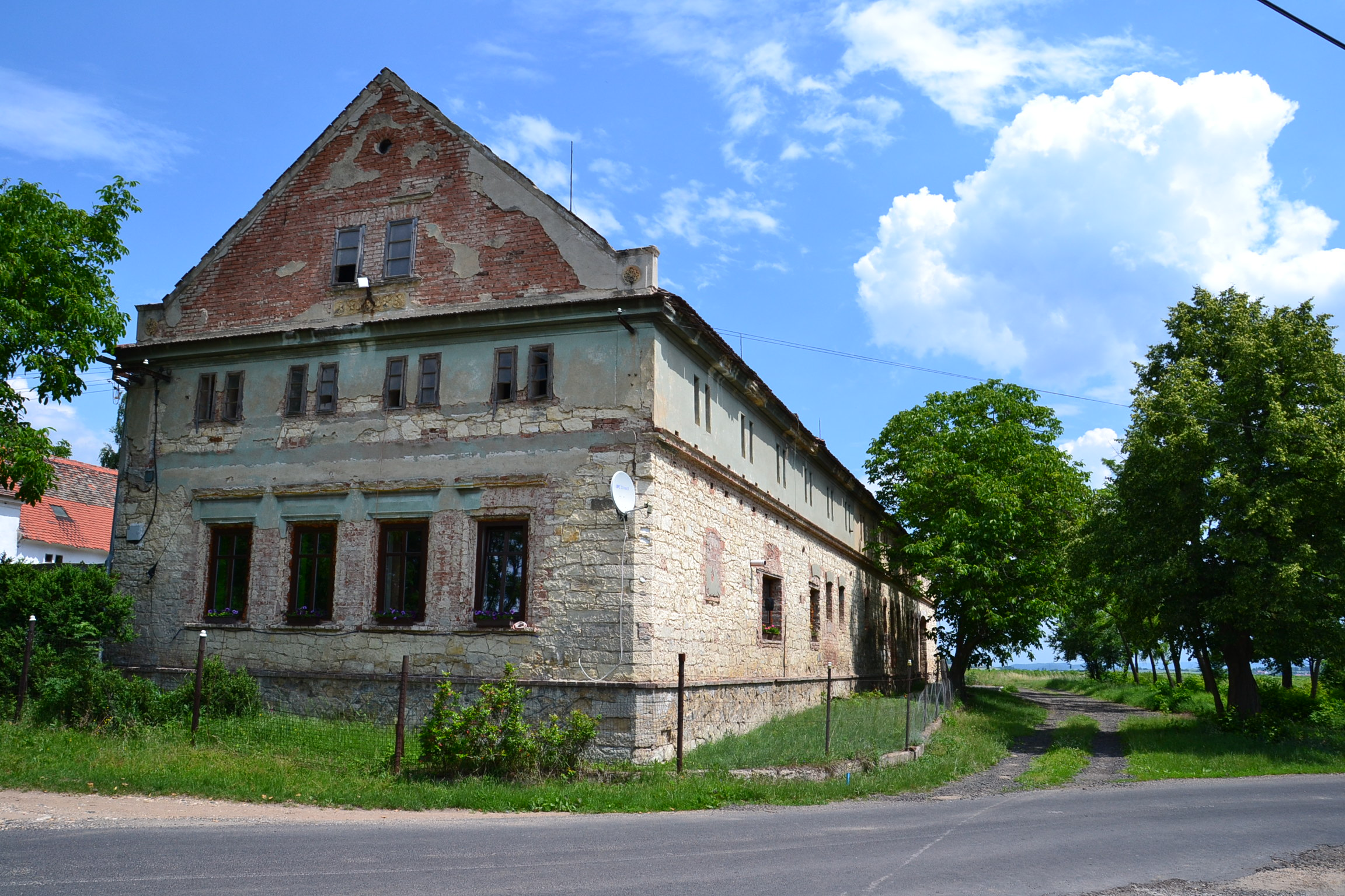 Vidovle